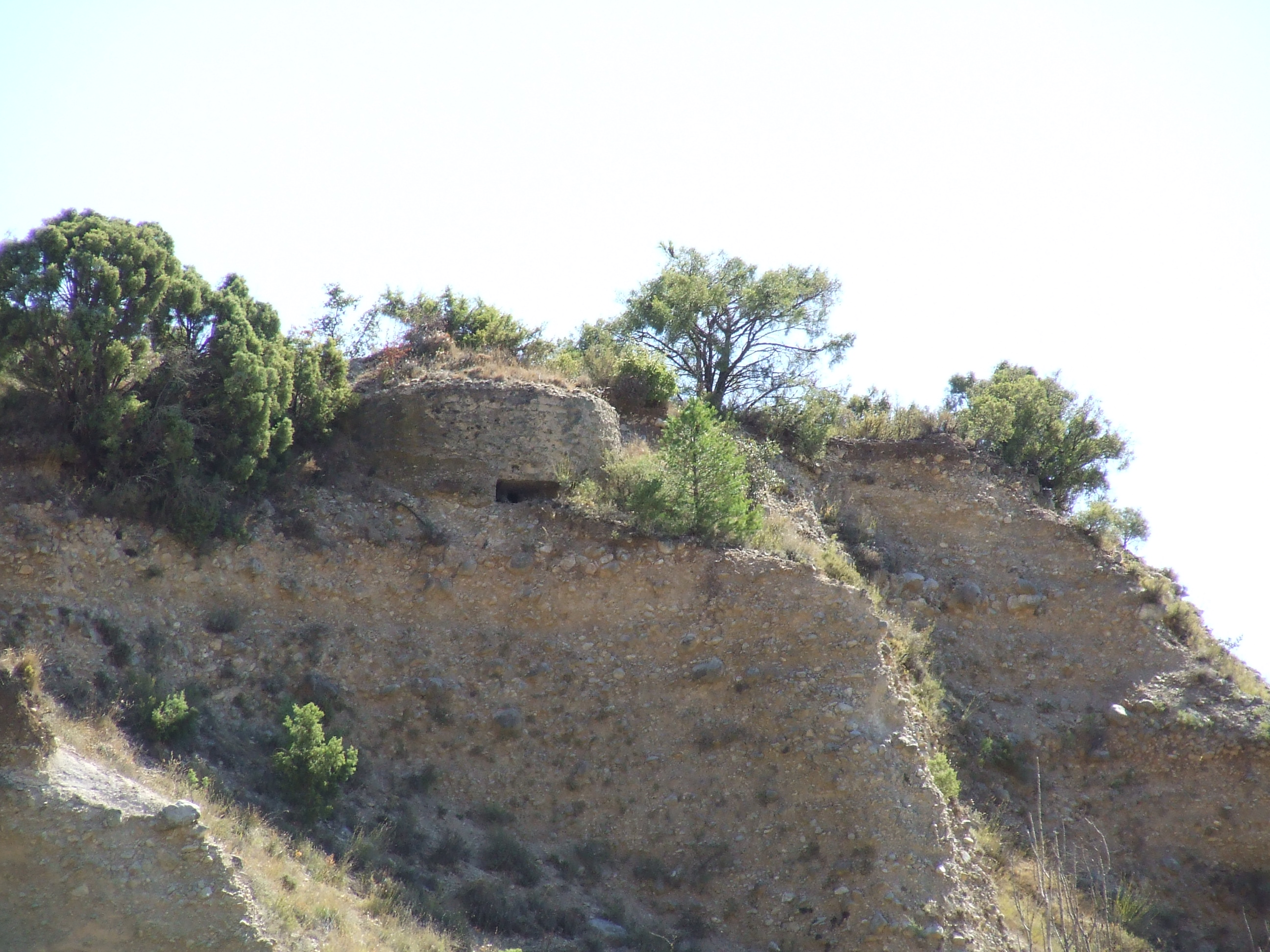 Un búnquer a l'Obac de Planers (Abella de la Conca, Pallarfs Jussà)